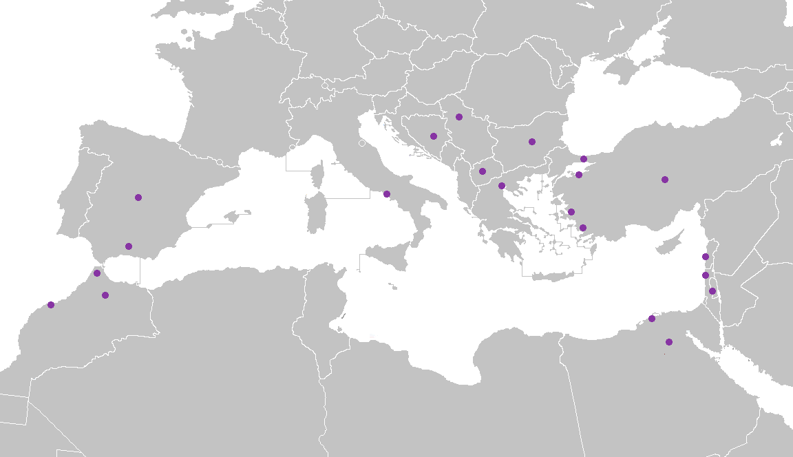 Comunidades sefardís en el área del Mediterráneo.